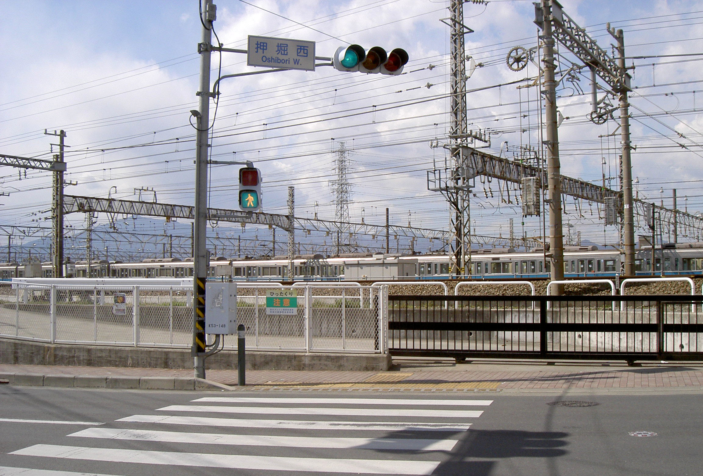 Former Ebina station (Moved), Odakyu Odawara line and Sotetsu line ja: 1973年に移転する以前の旧海老名駅跡